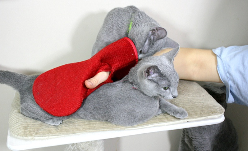 Pielęgnacja futra kota rosyjskiego niebieskiego